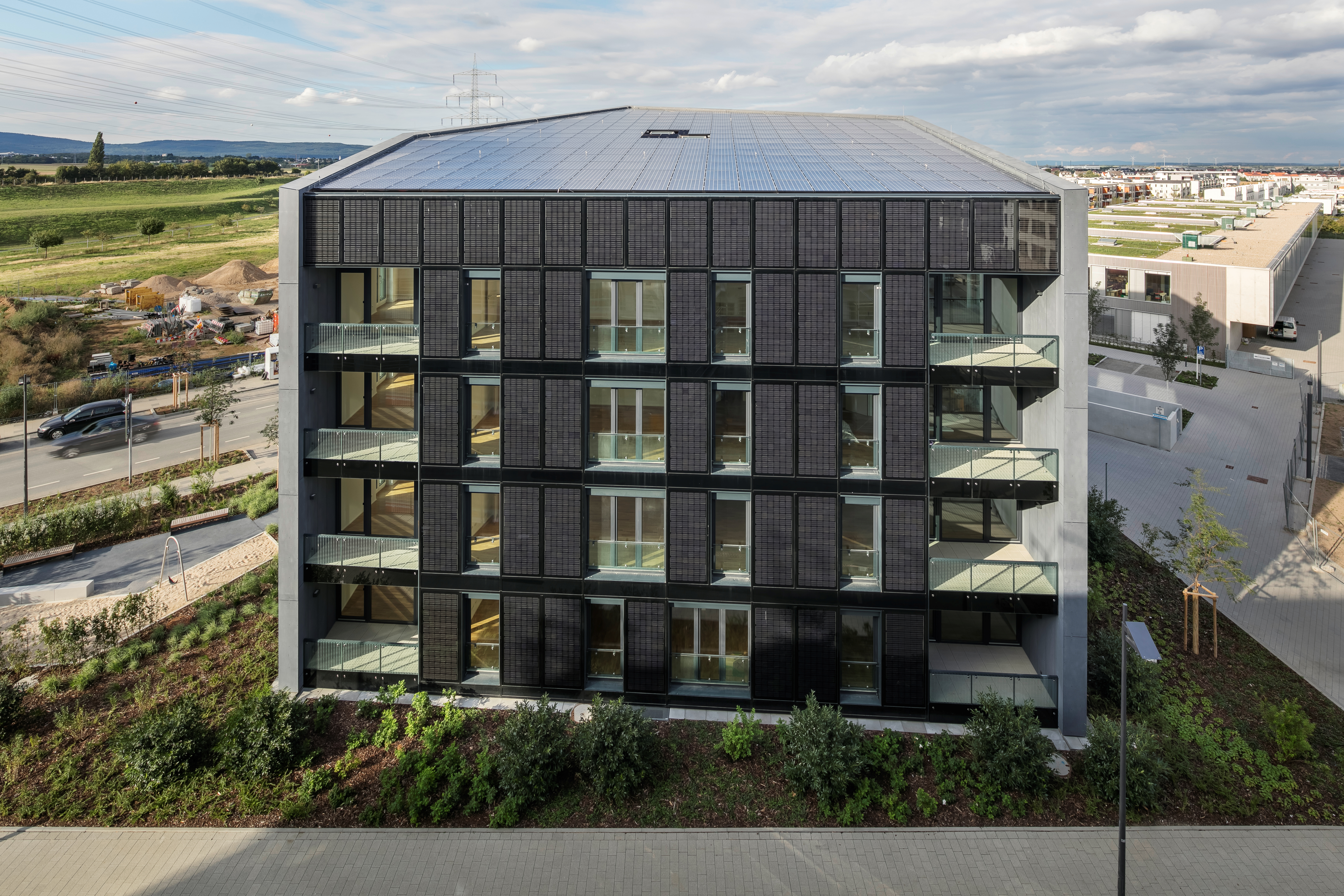 Effizienshausplus, Frankfurt | HHS Planer und Architekten AG, Kassel | ABG Frankfurt Holding